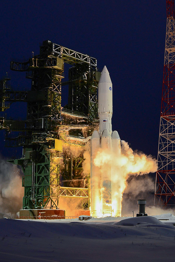 Первый испытательный пуск ракеты-носителя тяжелого класса «Ангара-А5» (космодром Плесецк, Архангельская обл.)